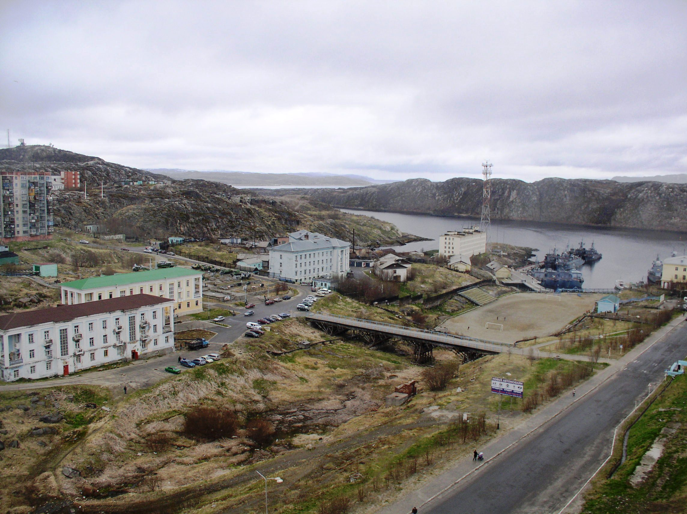 Вид на ТВ башню